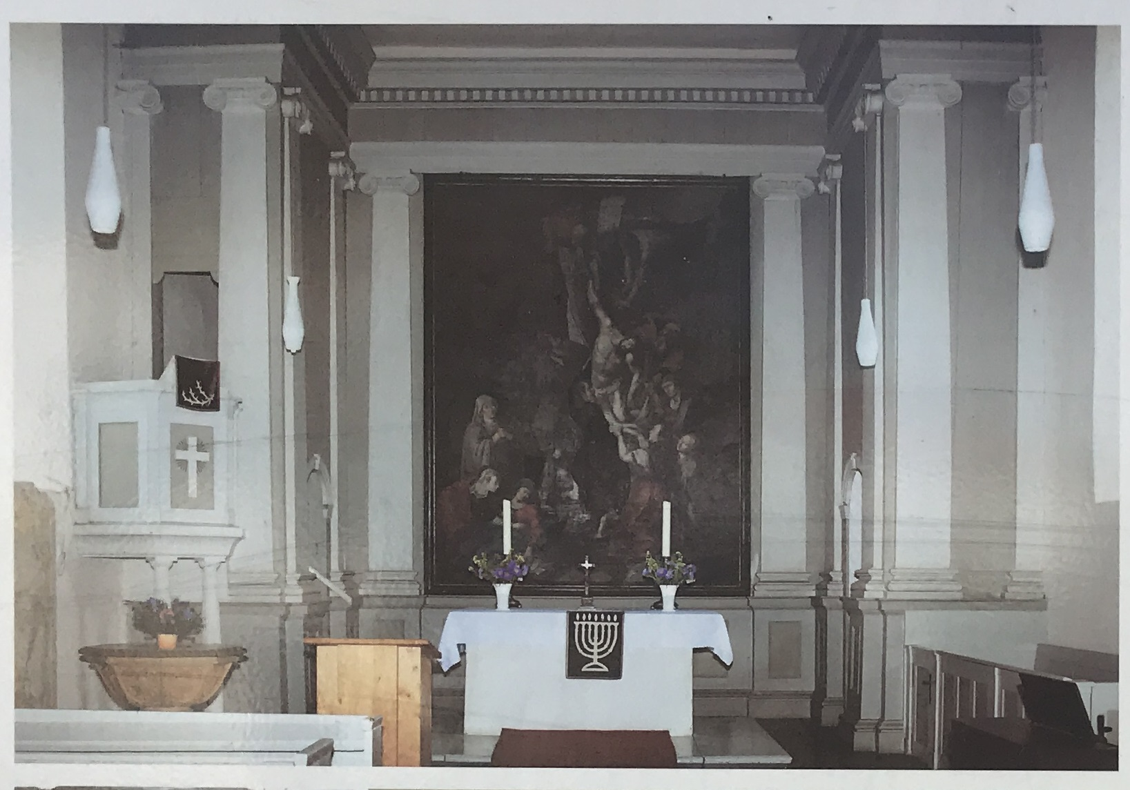 Die Dorfkirche Alt Madlitz ist eine frühgotische Feldsteinkirche in Briesen (Mark) im Landkreis Oder-Spree. Die Aufnahme wurde auf einer öffentlich zugänglichen Informationstafel vor der Kirche aufgenommen. Die Tafel stammt ausweislich einer Aufschrift vom Amt Odervorland, die Fotos vom „Verlag Die Furt“.